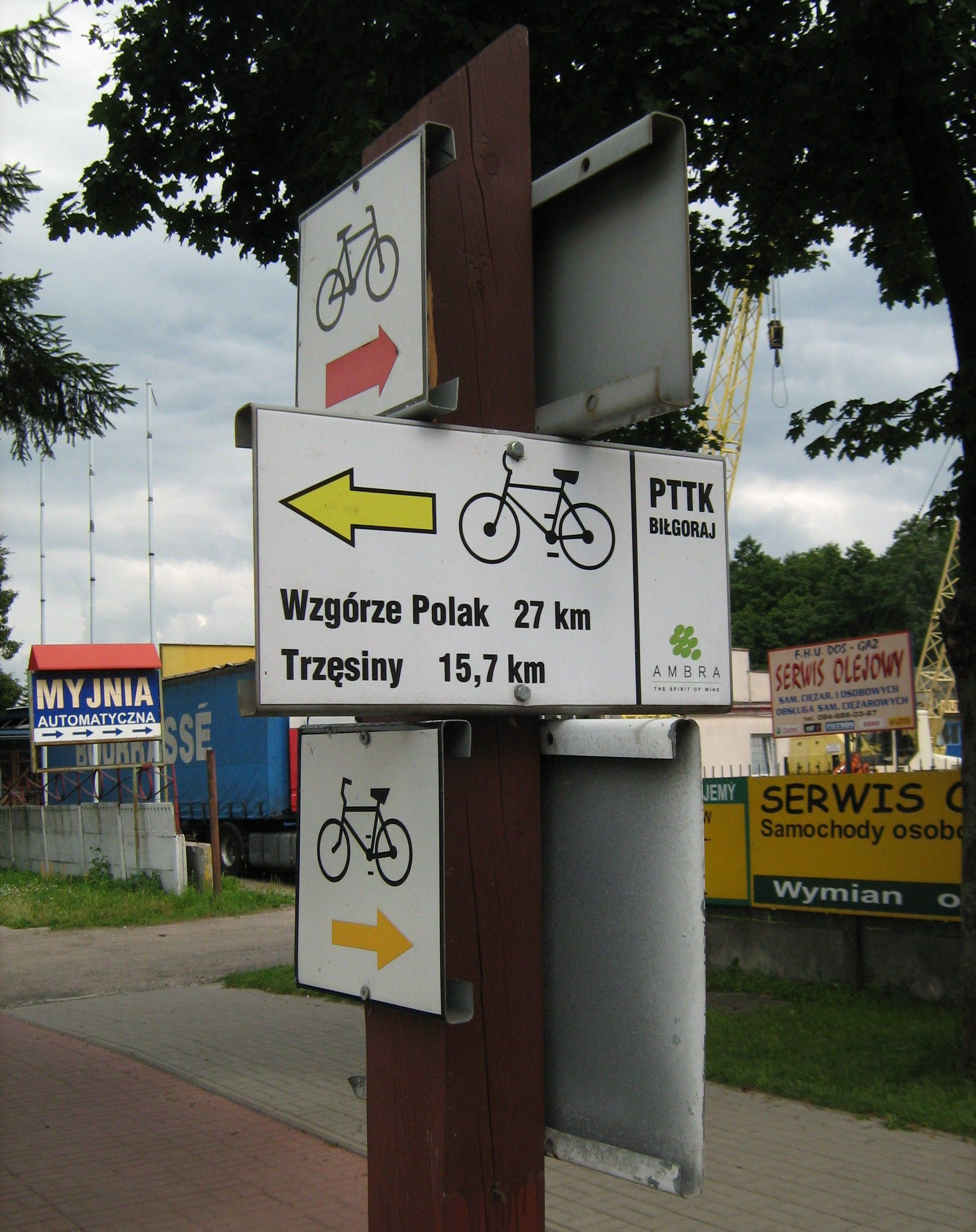 Znaki szlaków turystycznych, Biłgoraj, ul. Zamojska.